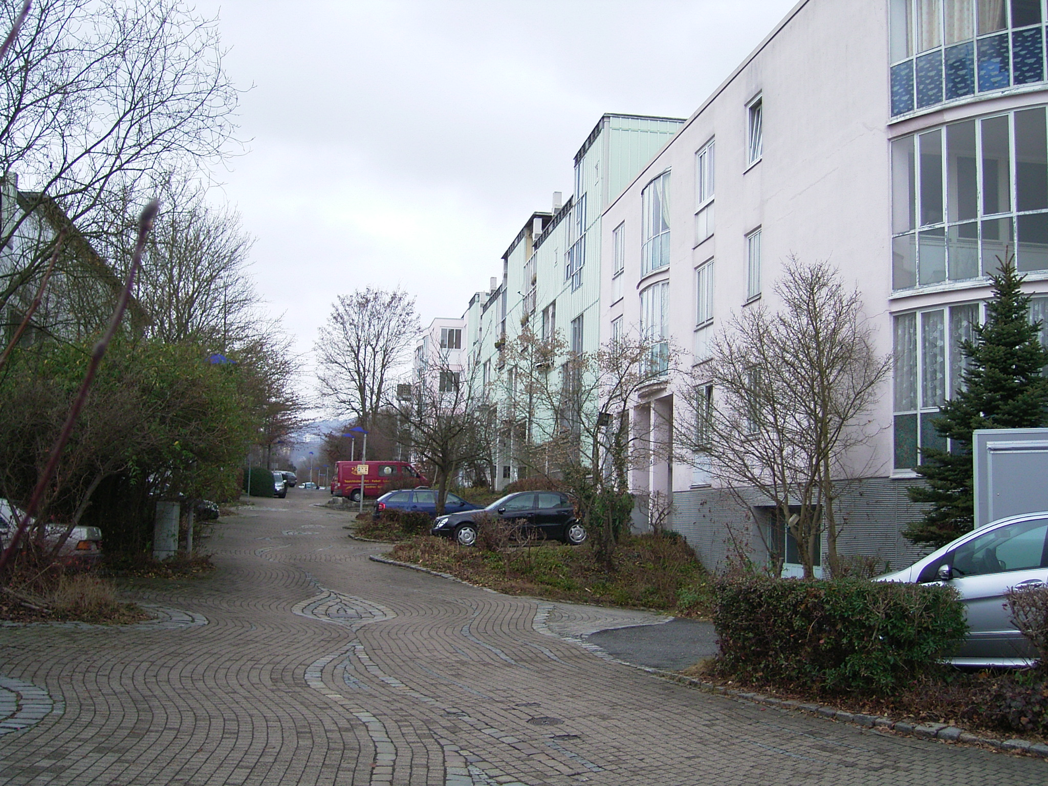 documenta urbana Wohngebäude in Kassel 1979-1982. Straßenraum